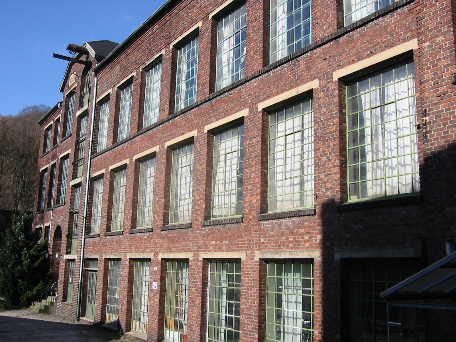 Fabrikgebäude der Bandfabrik Wilhlem Büsgen